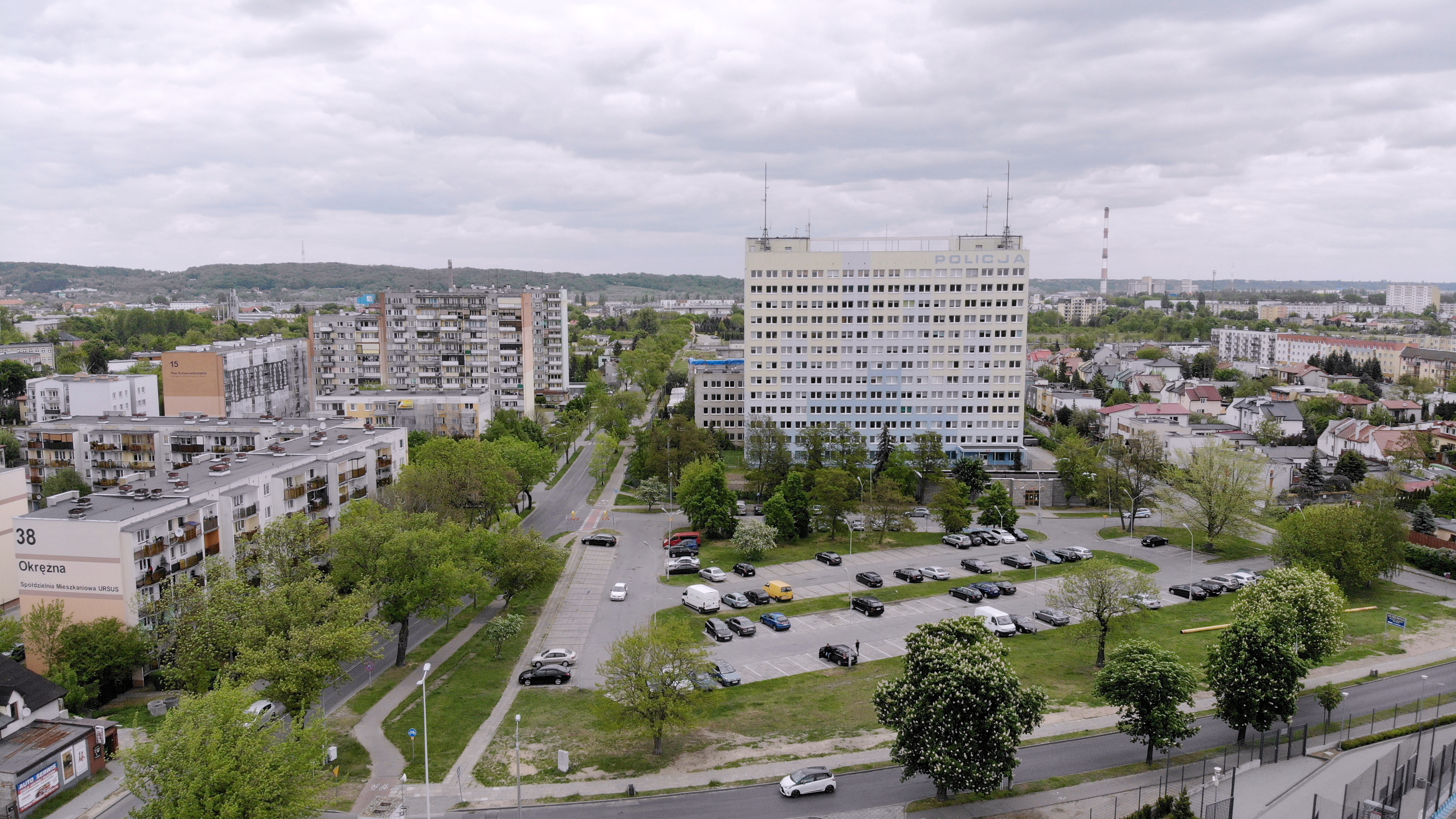 Styk Śródmieścia i Kazimierza Wielkiego (2020 r.)